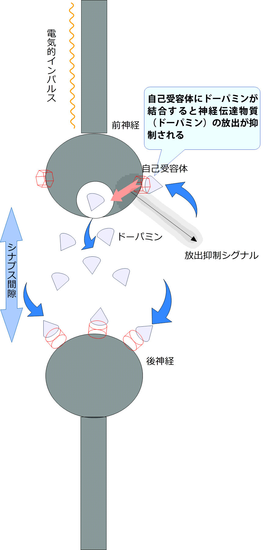 シナプス間隙のドーパミン濃度が増加すると、前シナプスの自己受容体に容量神経伝達で結合し、ドーパミンの放出を抑制する